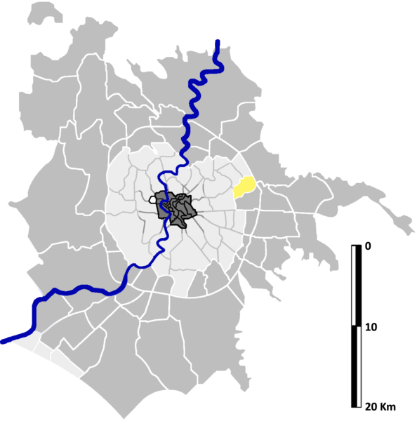 Tor Cervara